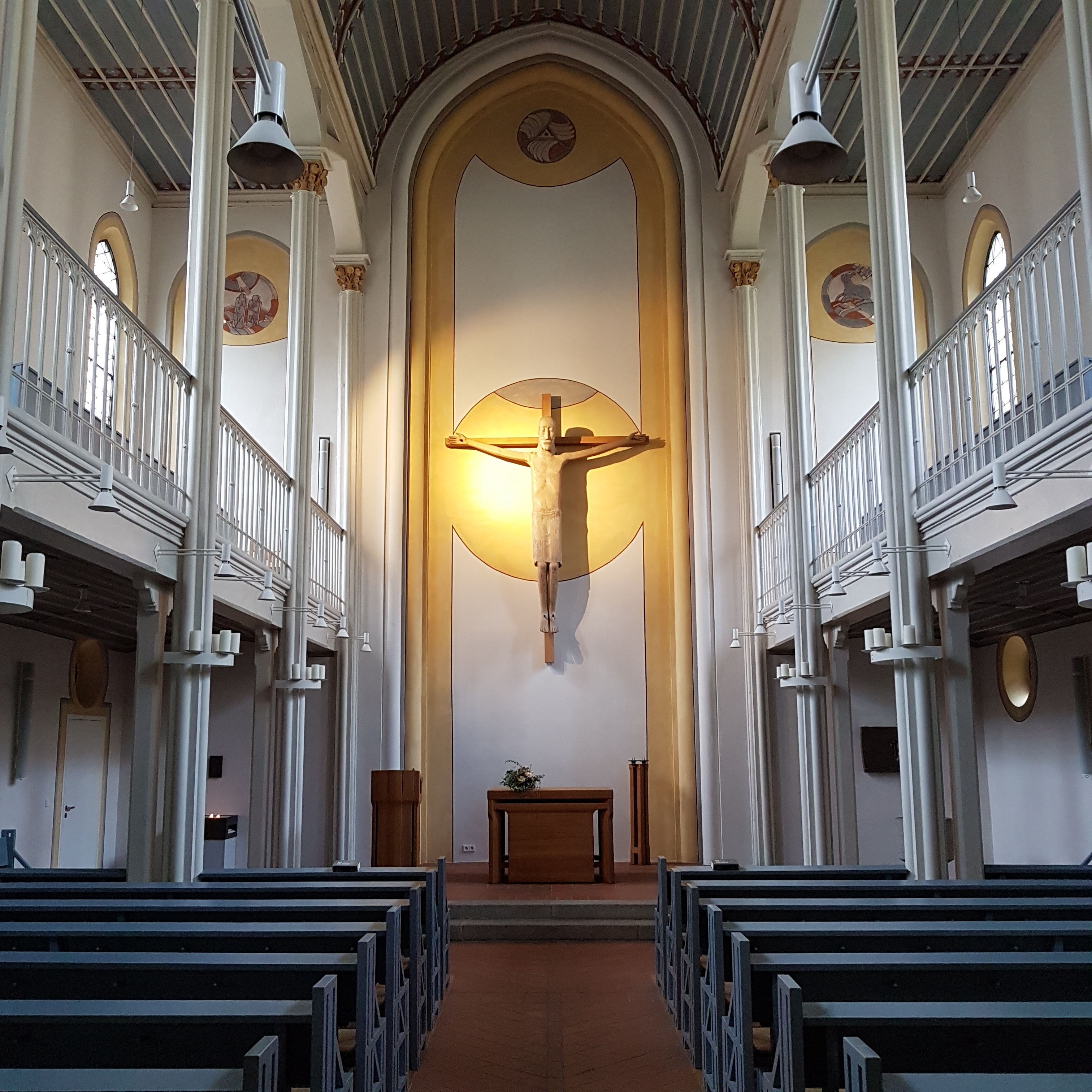 Passau, evang Matthäuskirche, Innenraum mit Blick zum Chor